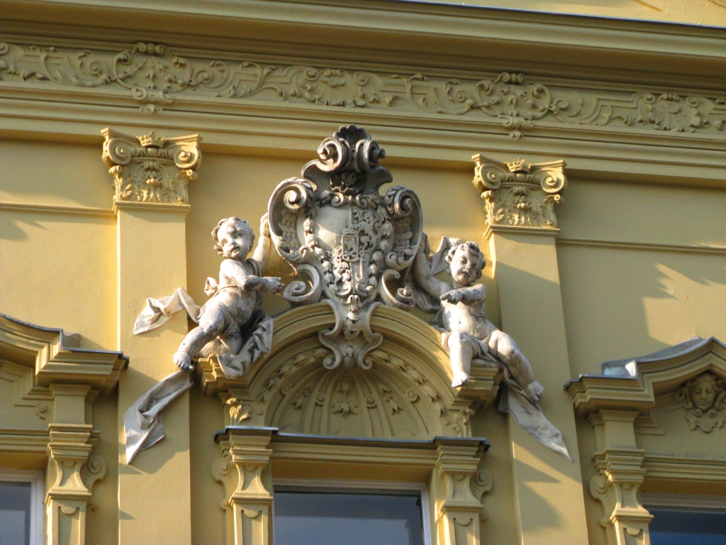 Ehem. Stadtpalais Kottulinsky, Graz